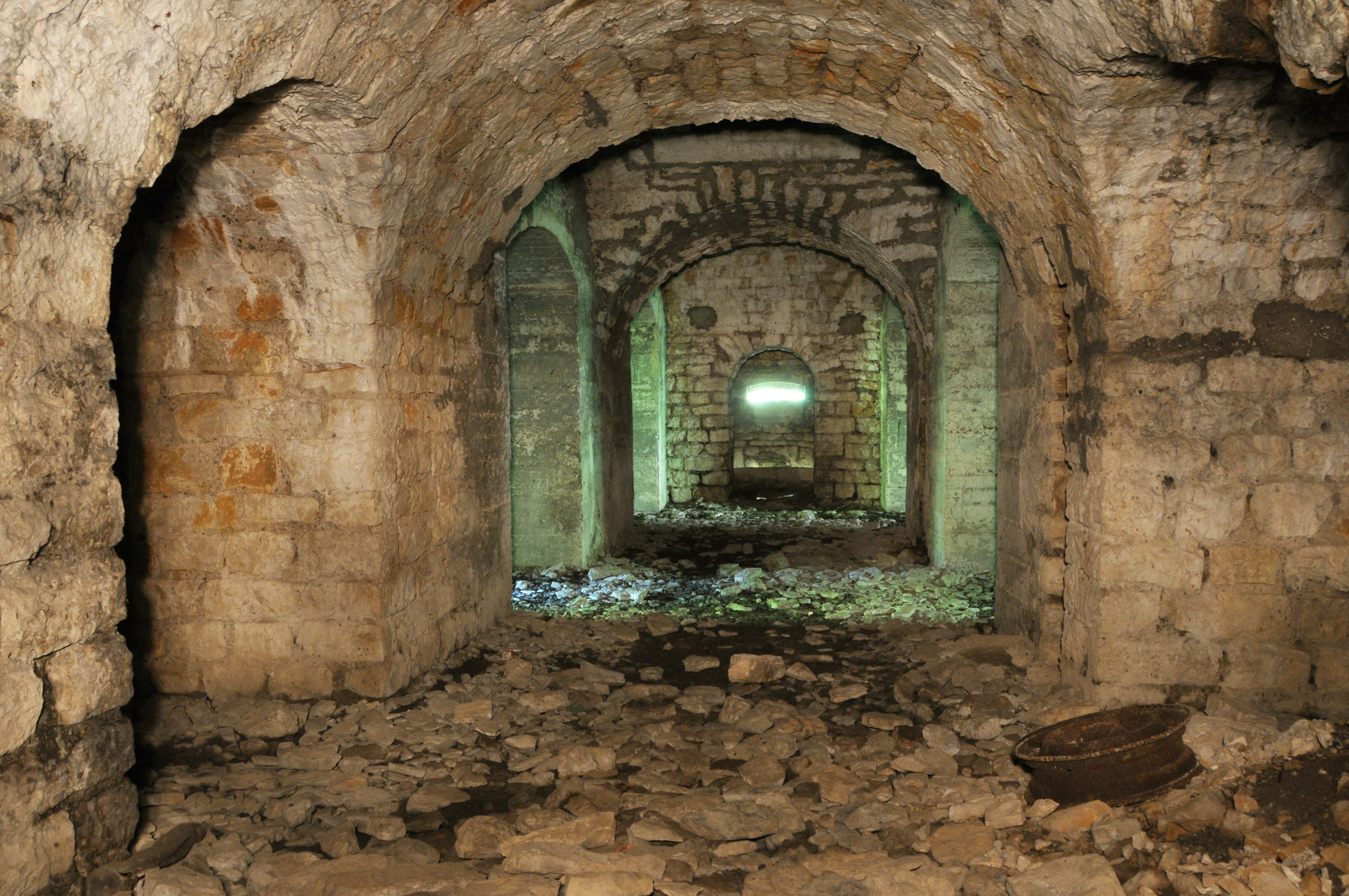 Dans la caponnière double nord. Salbert hill fortifications.